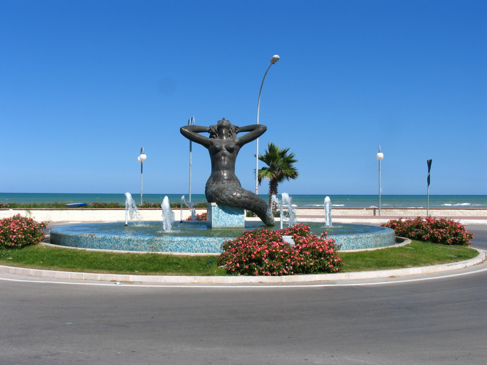 Tortoreto Lido - Fontana della Sirena This is a photo of a monument which is part of cultural heritage of Italy.